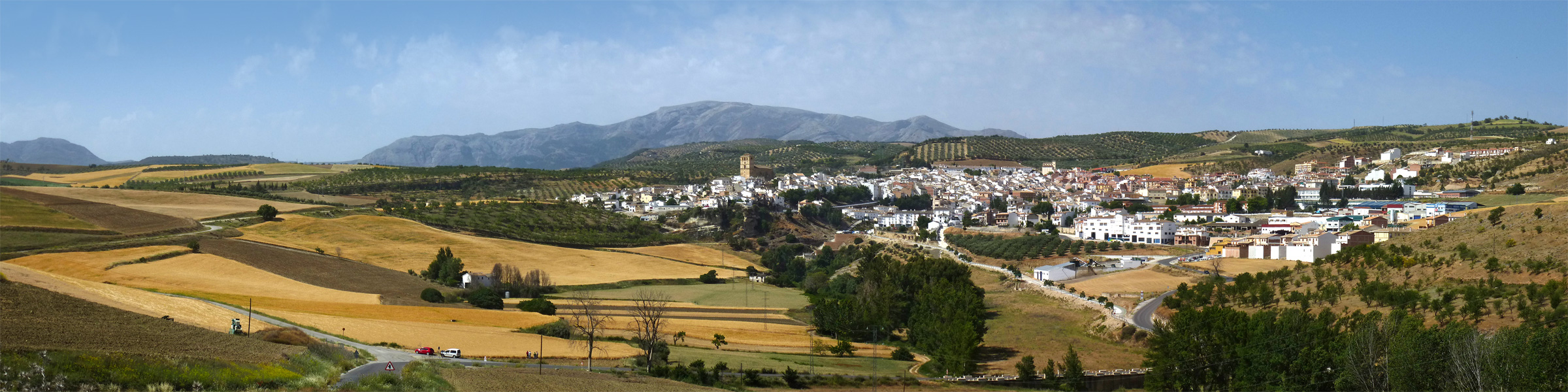 Vista panorámica desde la A402, Alhama de Granada, Andalucía, España.